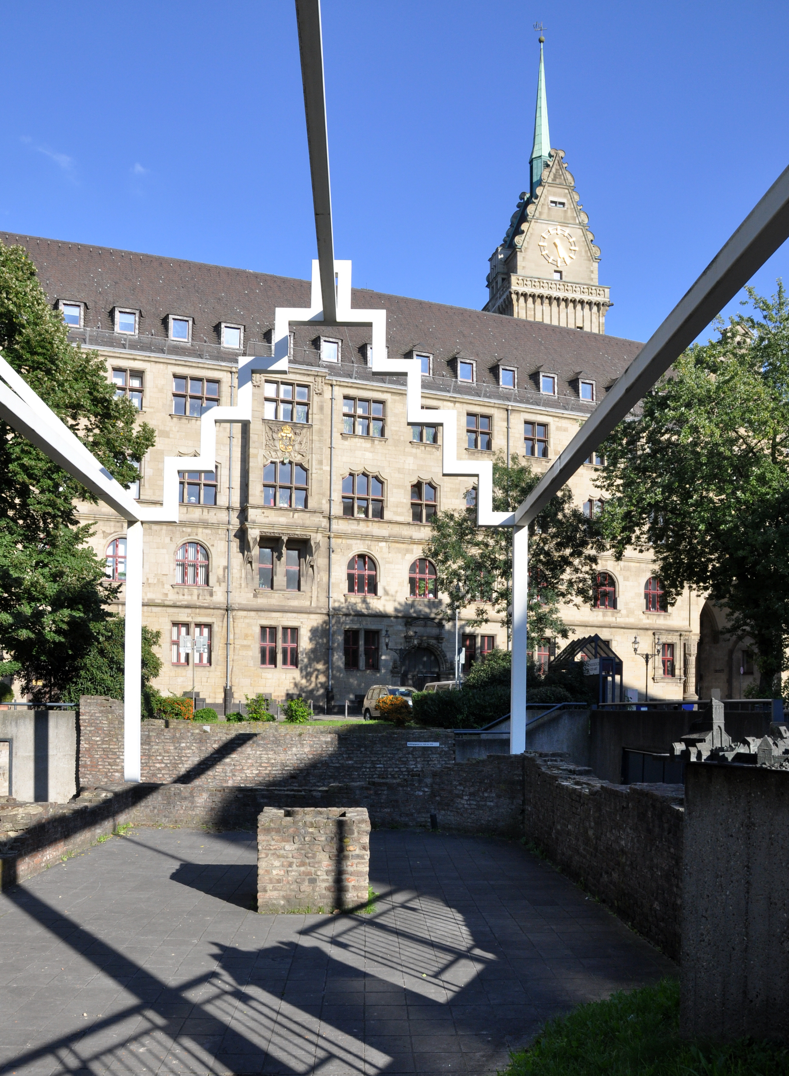 Rekonstruktion der Umrisse der Hallen am Alten Markt und Rathaus.This is a photograph of an architectural monument., no. 30